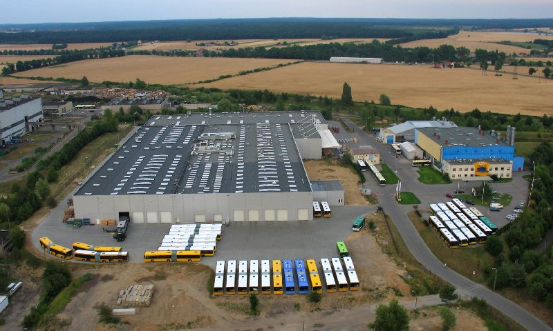 Bolechowo, fabryka Solarisa.